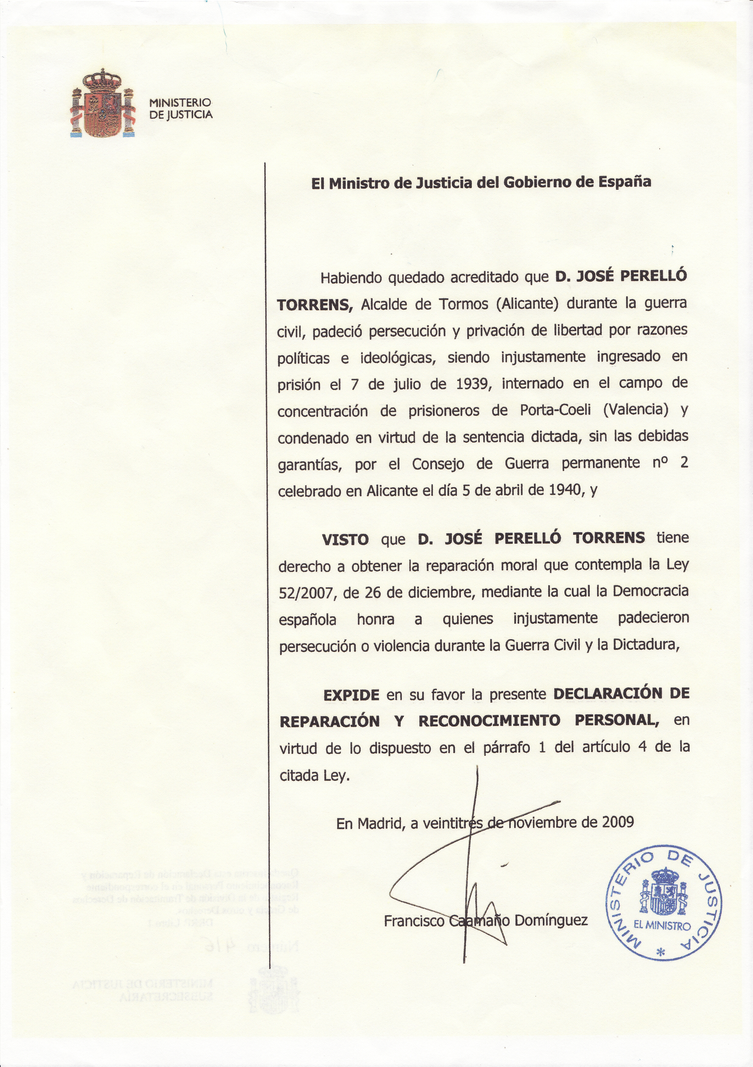 Declaració reparació i rehabilitació